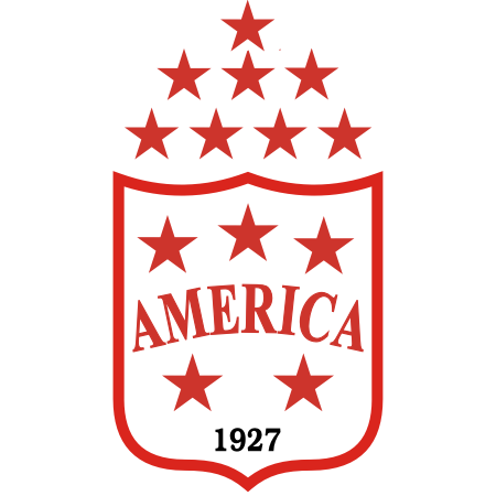 Una serie de objetos geométricos y textos que la gente podría relacionar con el club América de Cali.